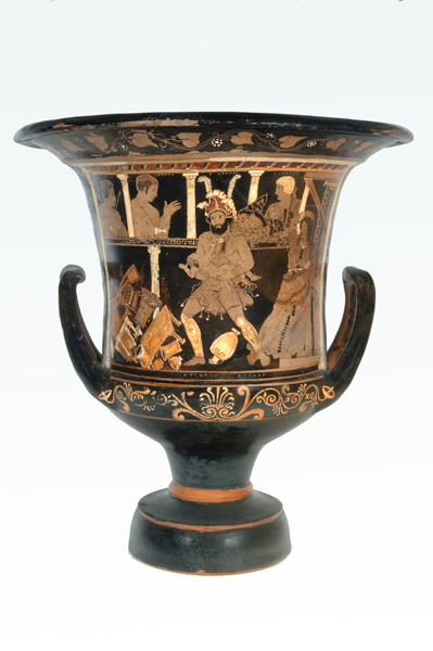 Crátera de la locura de Heracles (Cultura Griega). Número de inventario: 11094.